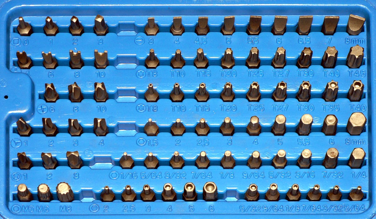 bits